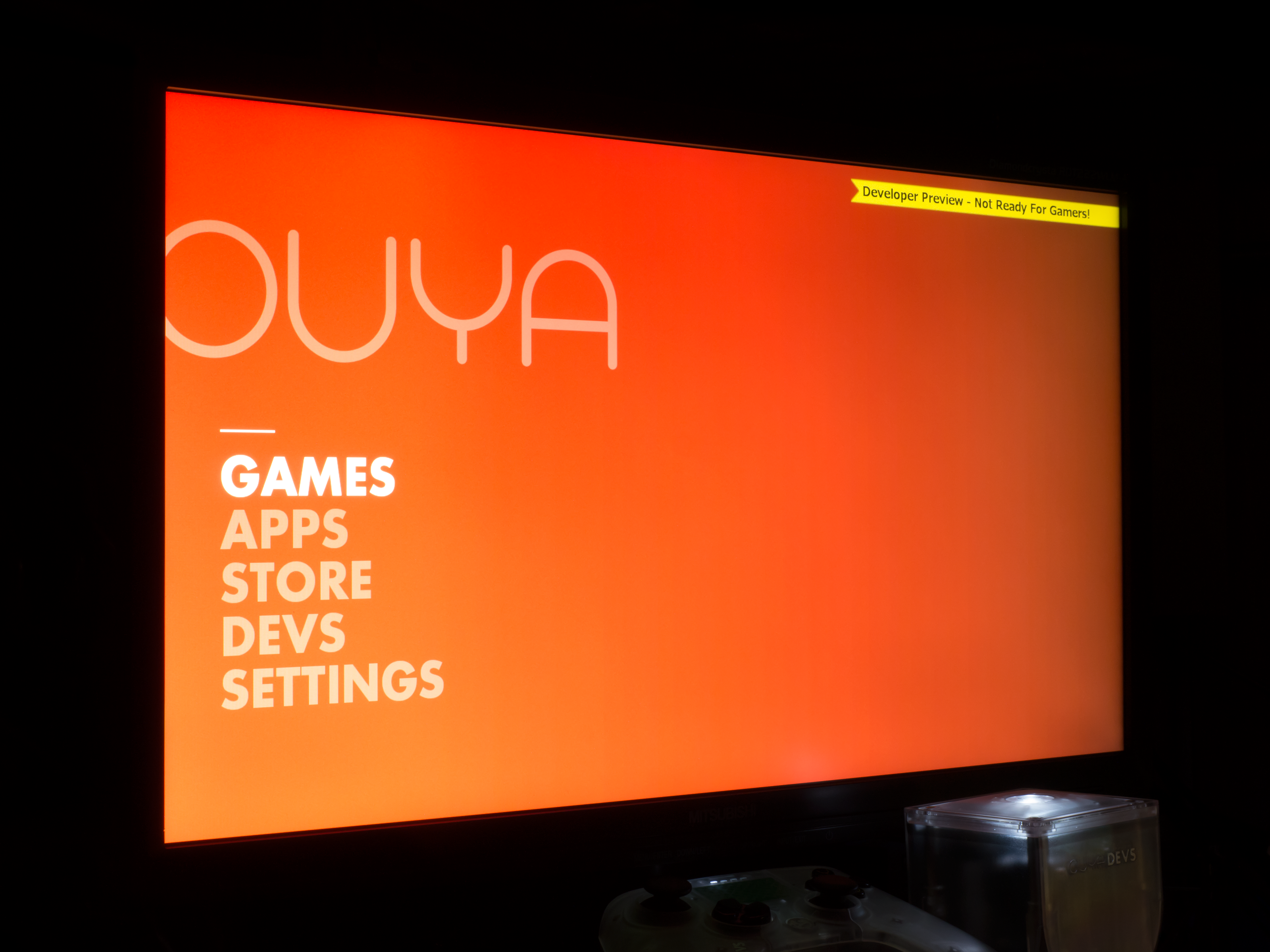 OUYA Developer Console メニュー画面